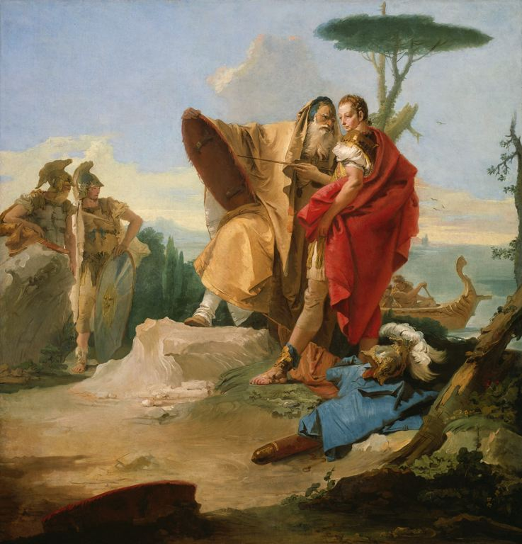 Giovanni Battista Tiepolo - Rinaldo ed il mago di Ascalona - Art Institute of Chicago